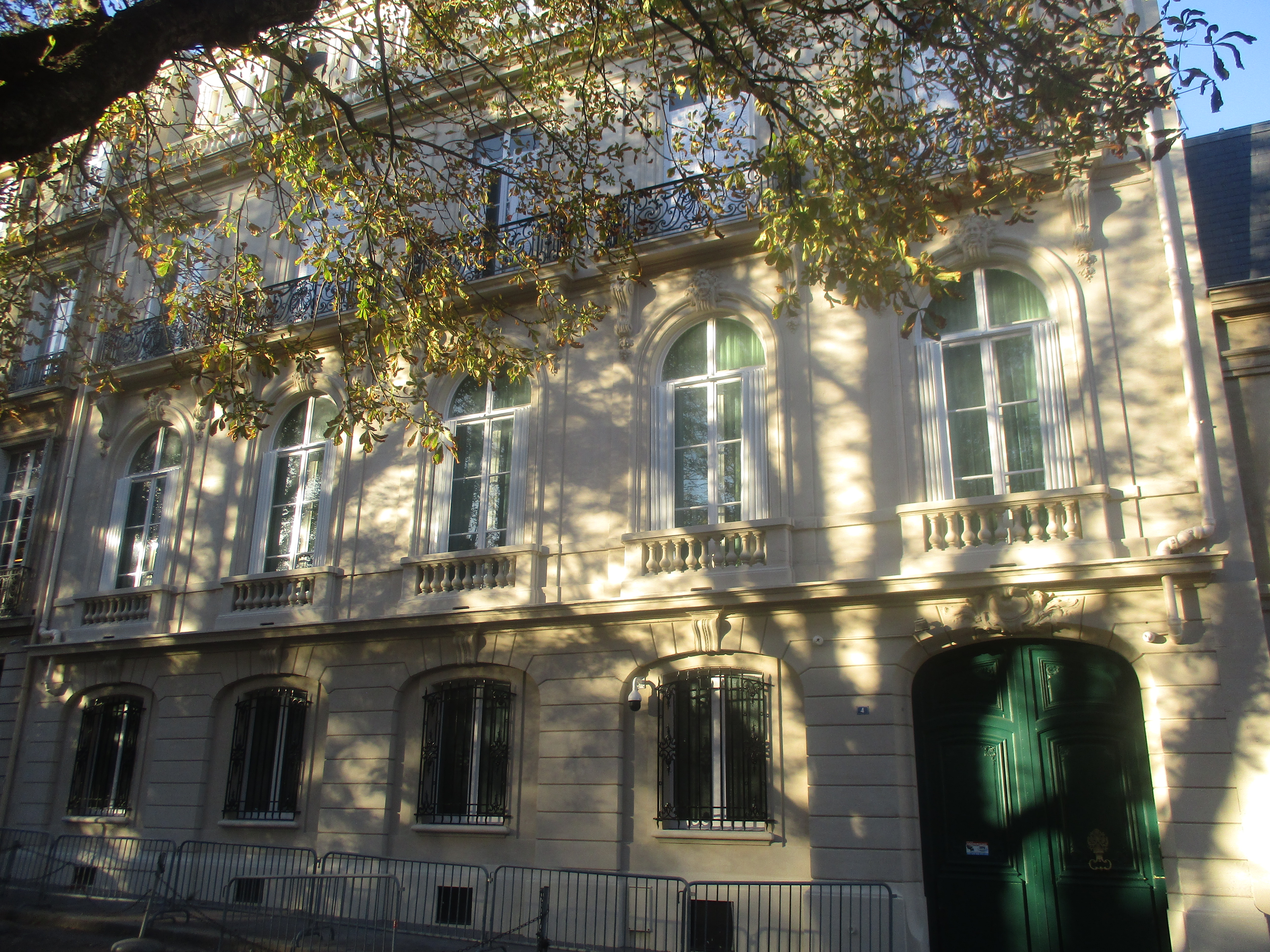 4 place des États-Unis, Paris XVIe. Hôtel Deutsch de la Meurthe, puis résidence d'Alec et Francine Weisweller. Aujourd'hui résidence de l'ambassadeur du Koweït.